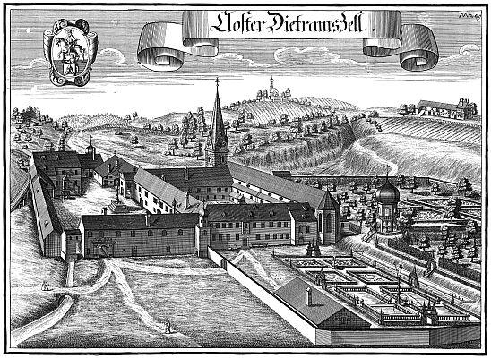 Kloster Dietramszell; Kupferstich von Michael Wening